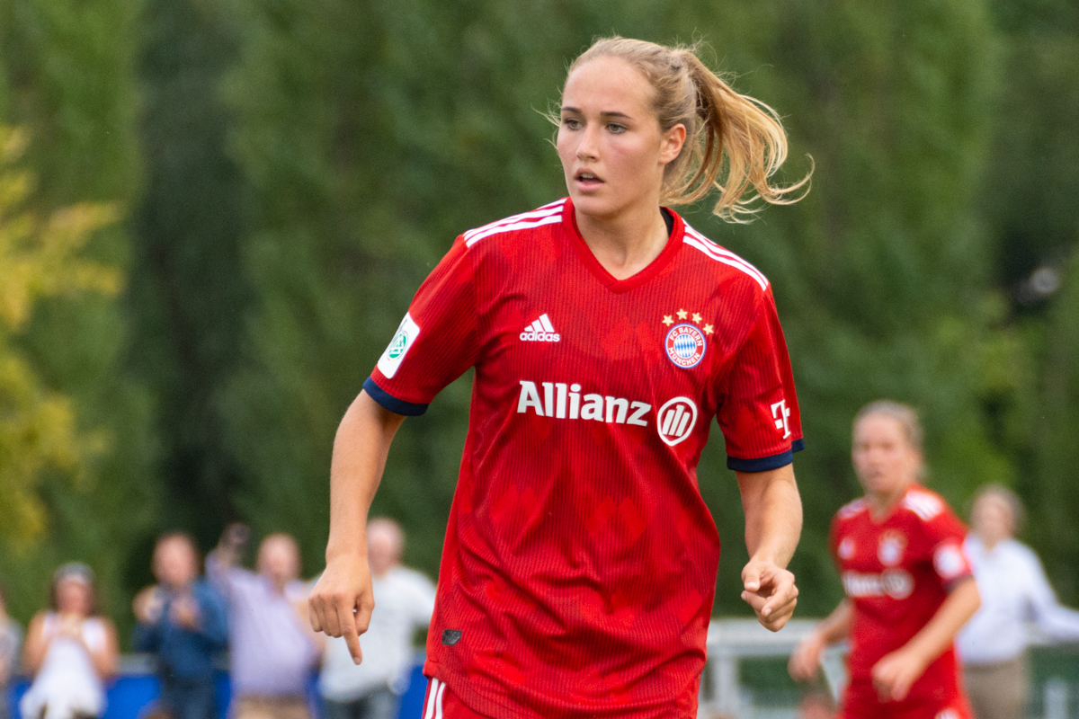 Sydney Lohmann im DFB-Pokal-Spiel gegen den FF USV Jena